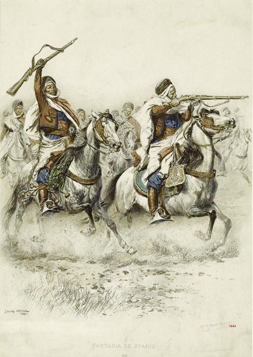 Spahis, fantasia, 1886.